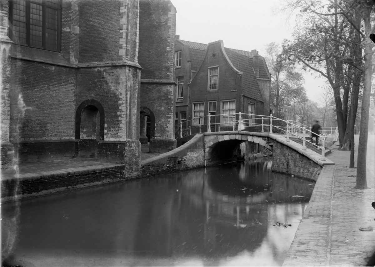 Beiaardiershuisje aan de Kerkstraat te Delft met ervoor de Vrouwe van Rijnsburgerbrug.